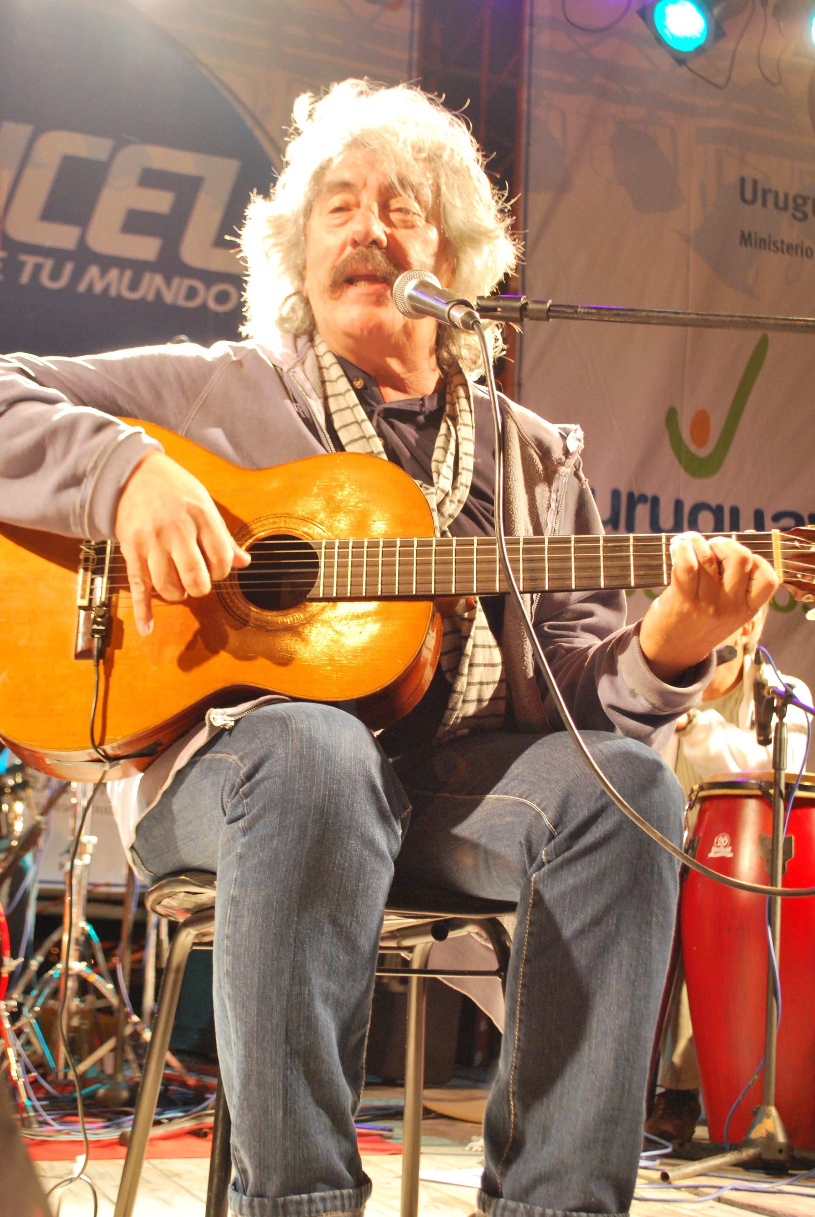 Fotografía del músico popular uruguayo José Carbajal "El Sabalero" en un espectáculo brindado en Atlántida (Canelones), en el marco del programa "Uruguay a toda costa".